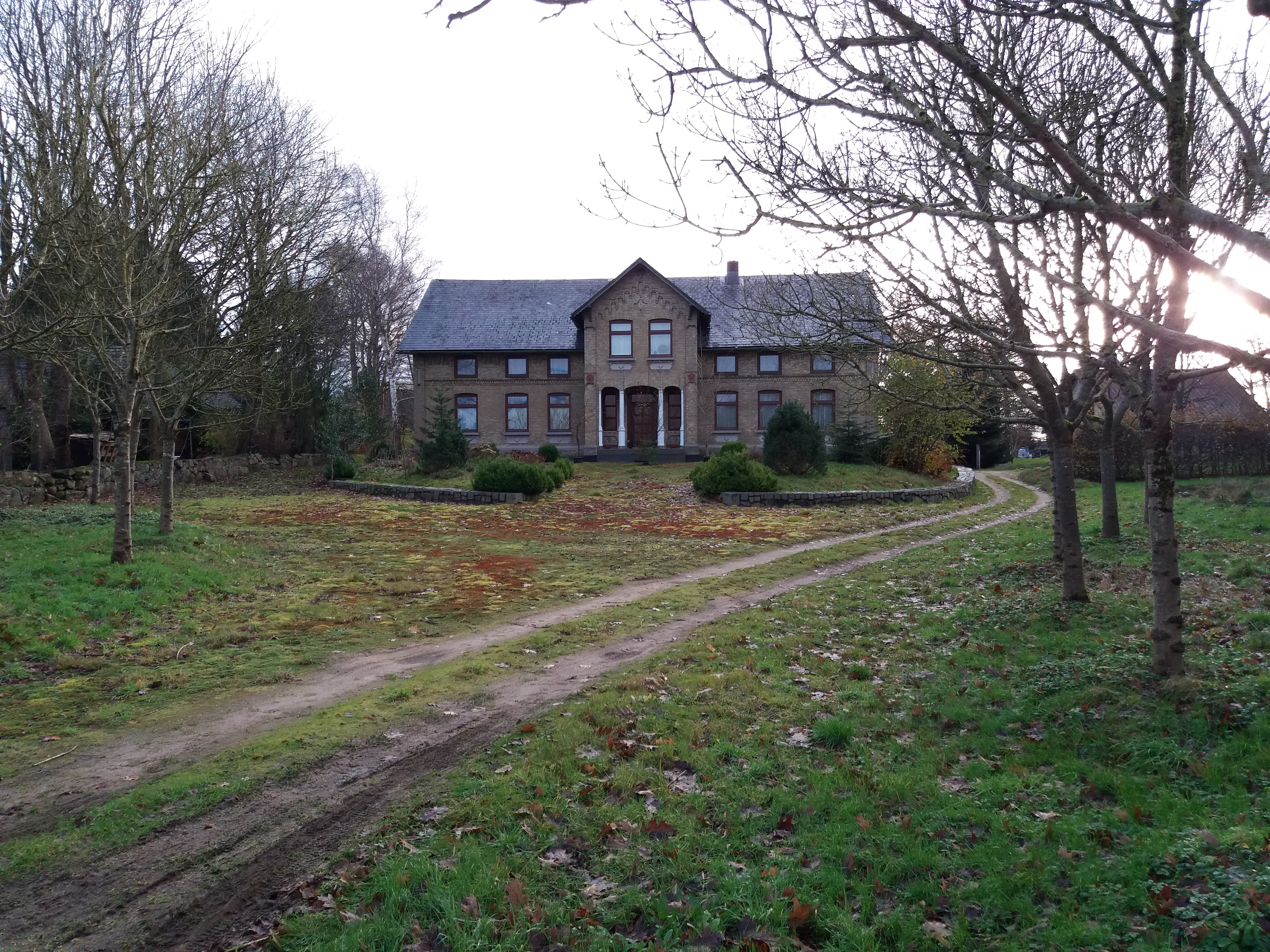 Gebäude in Hamdorf